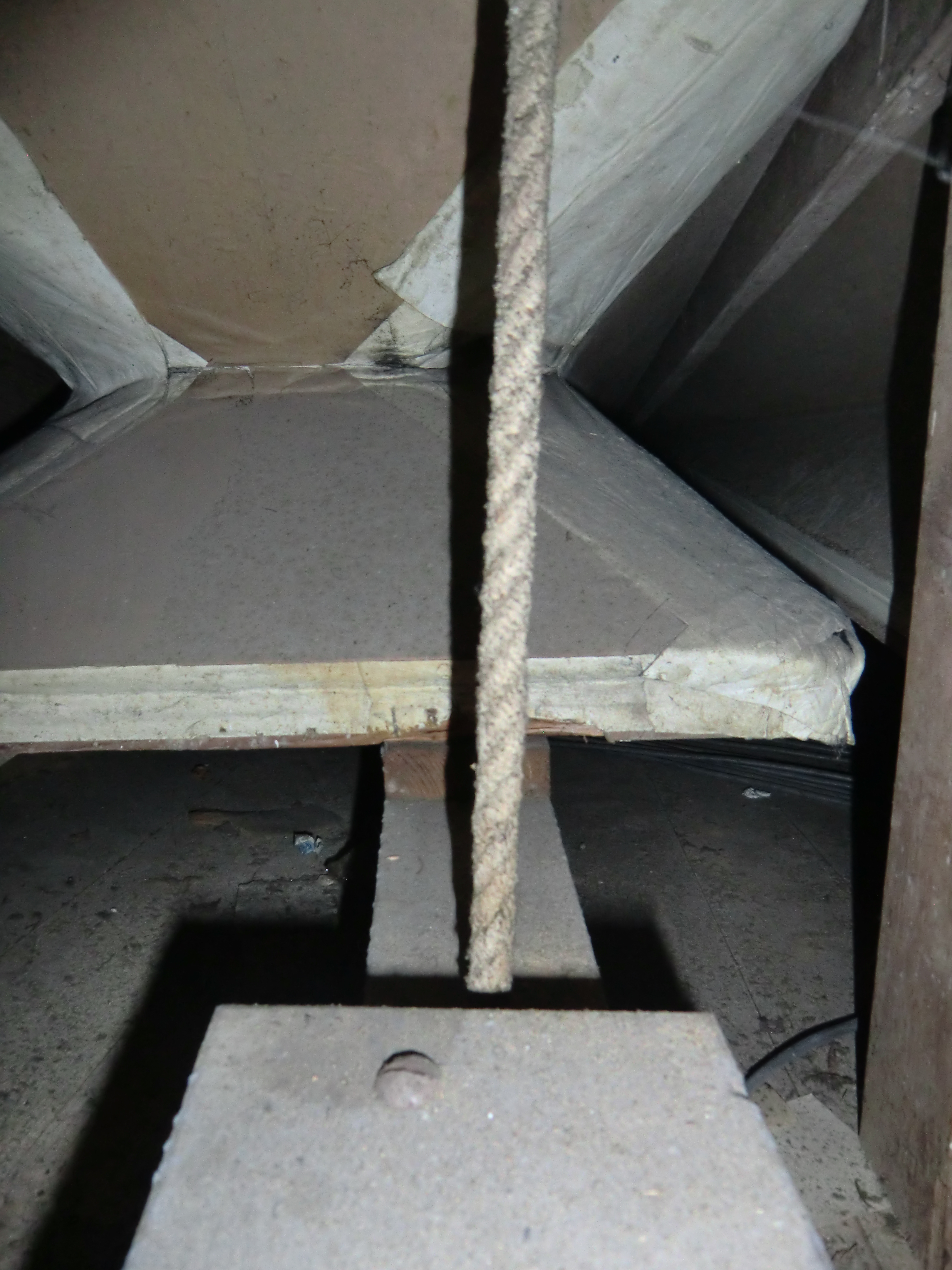 Horn-Orgel in Ransel (1912) - Kalkantentritt und aufgezogener Schöpfbalg